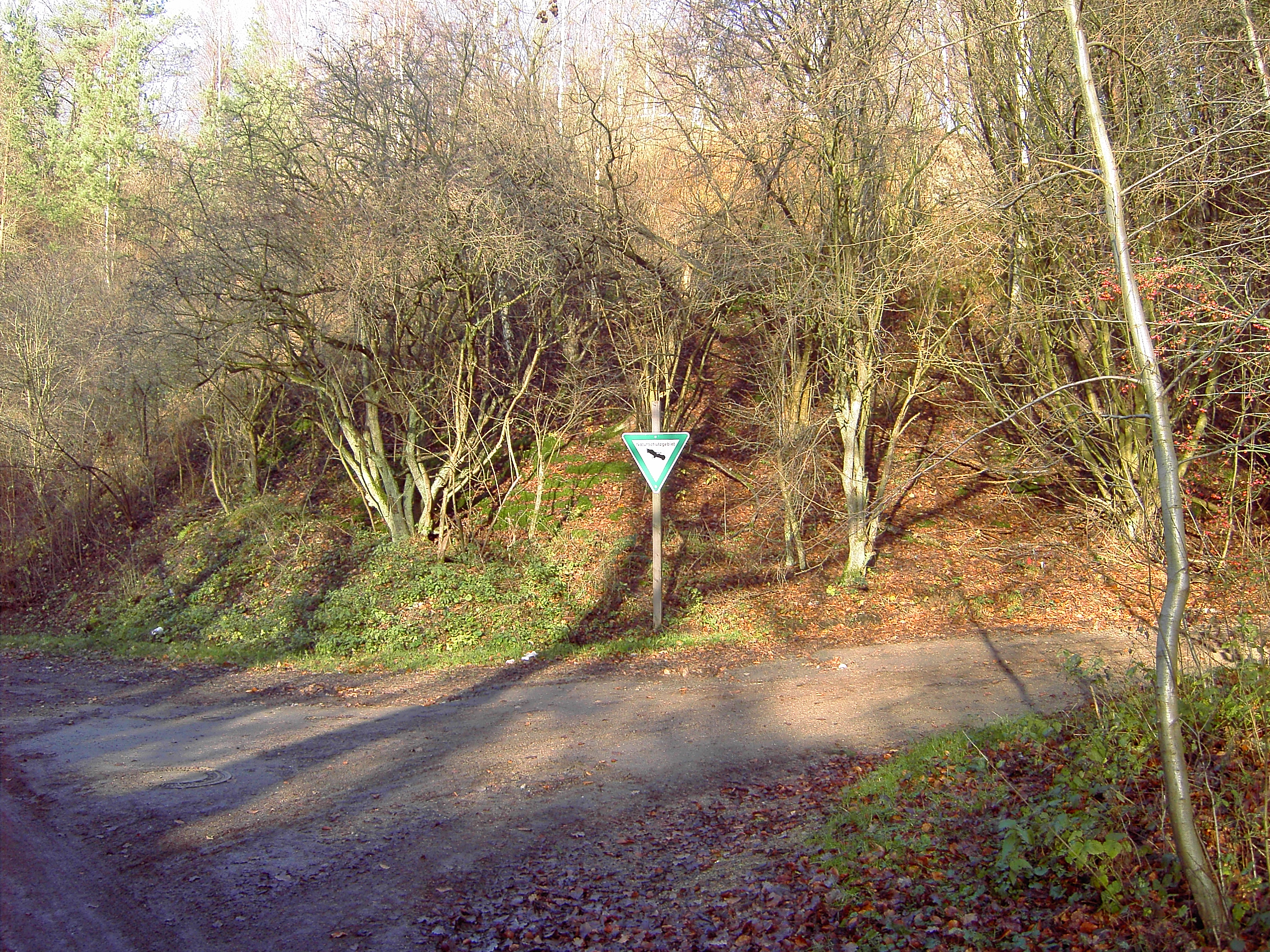 Naturschutzgebiet Auf der Rüst